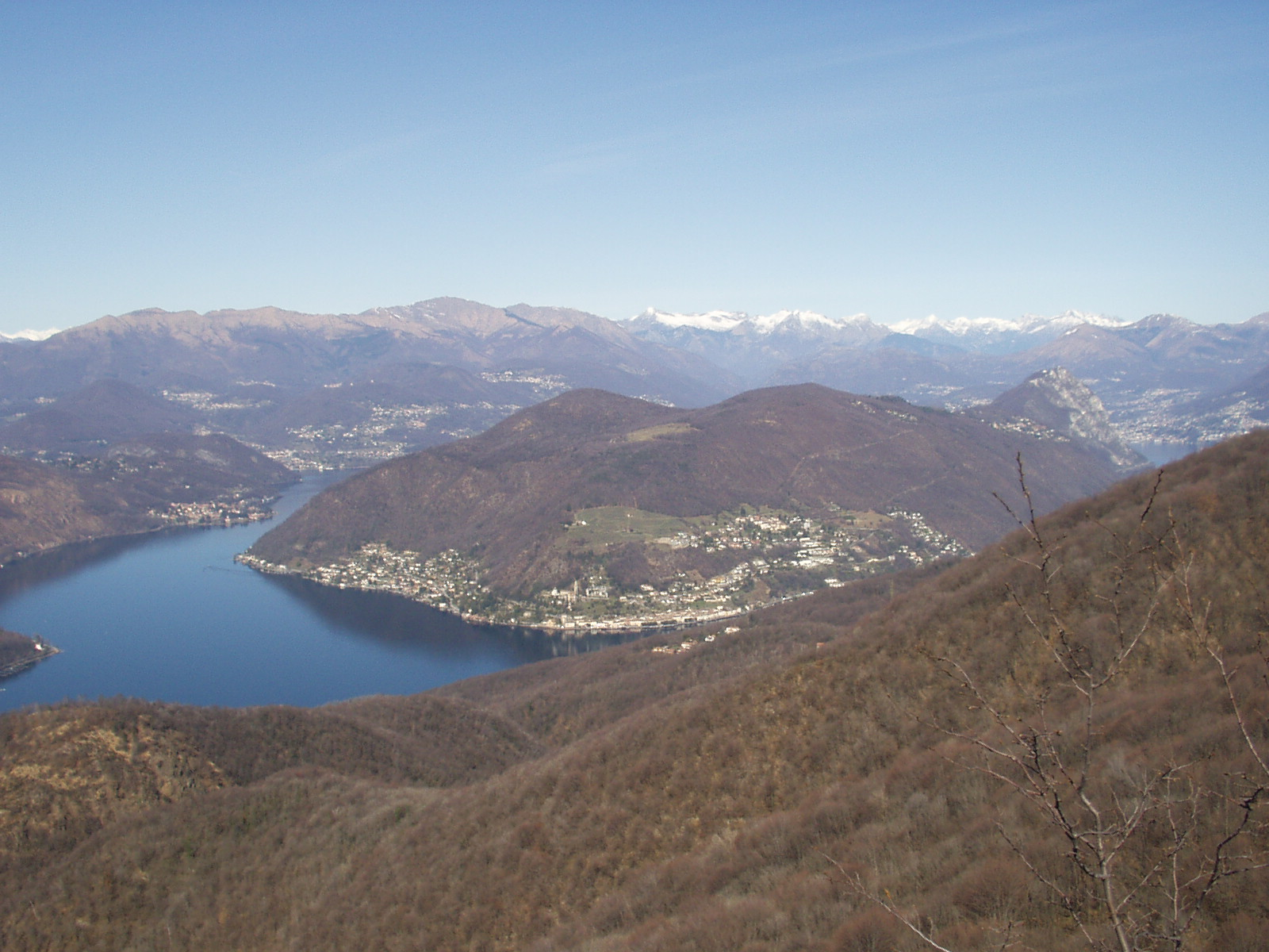 Il Lago di Lugano visto dal Monte Orsa nel Giugno 2007